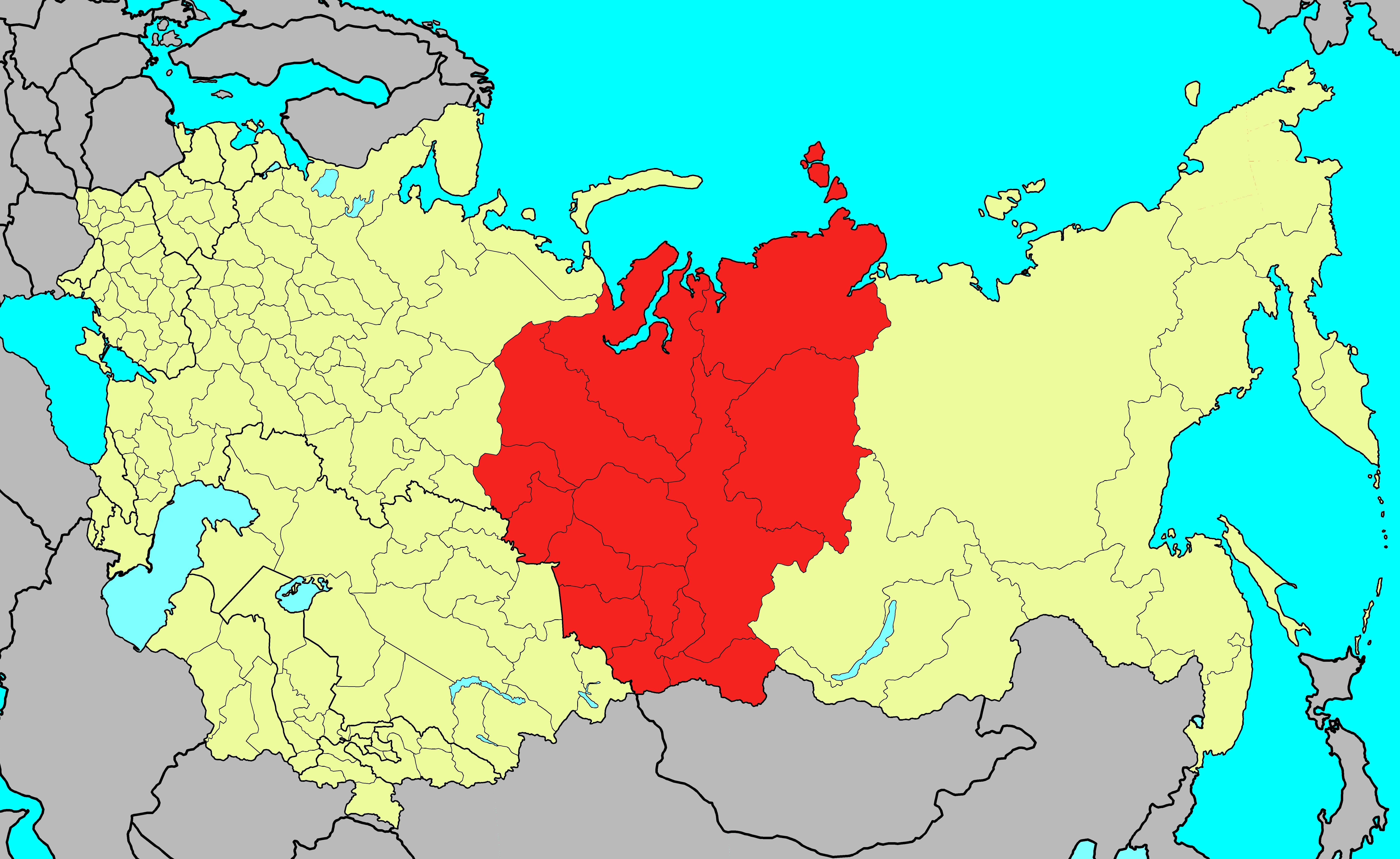 Сибирский военный округ ВС СССР на 1991 год